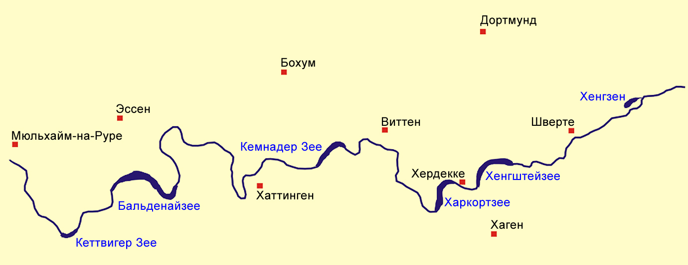 Северный Рейн - Вестфалия. Схема водохранилищ на Руре